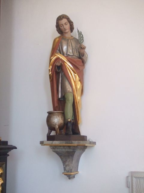 Pfarrkirche St. Vitus, (Attenweiler-)Rupertshofen Der hl. Veit